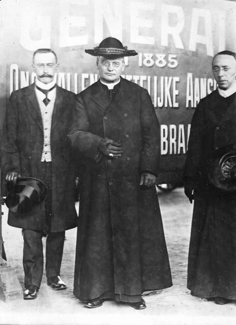 Cardinal van Rossum (photographie de presse)